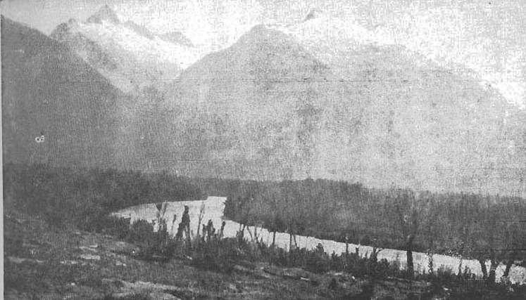 Río Los Nadis, tributario del rio Baker.